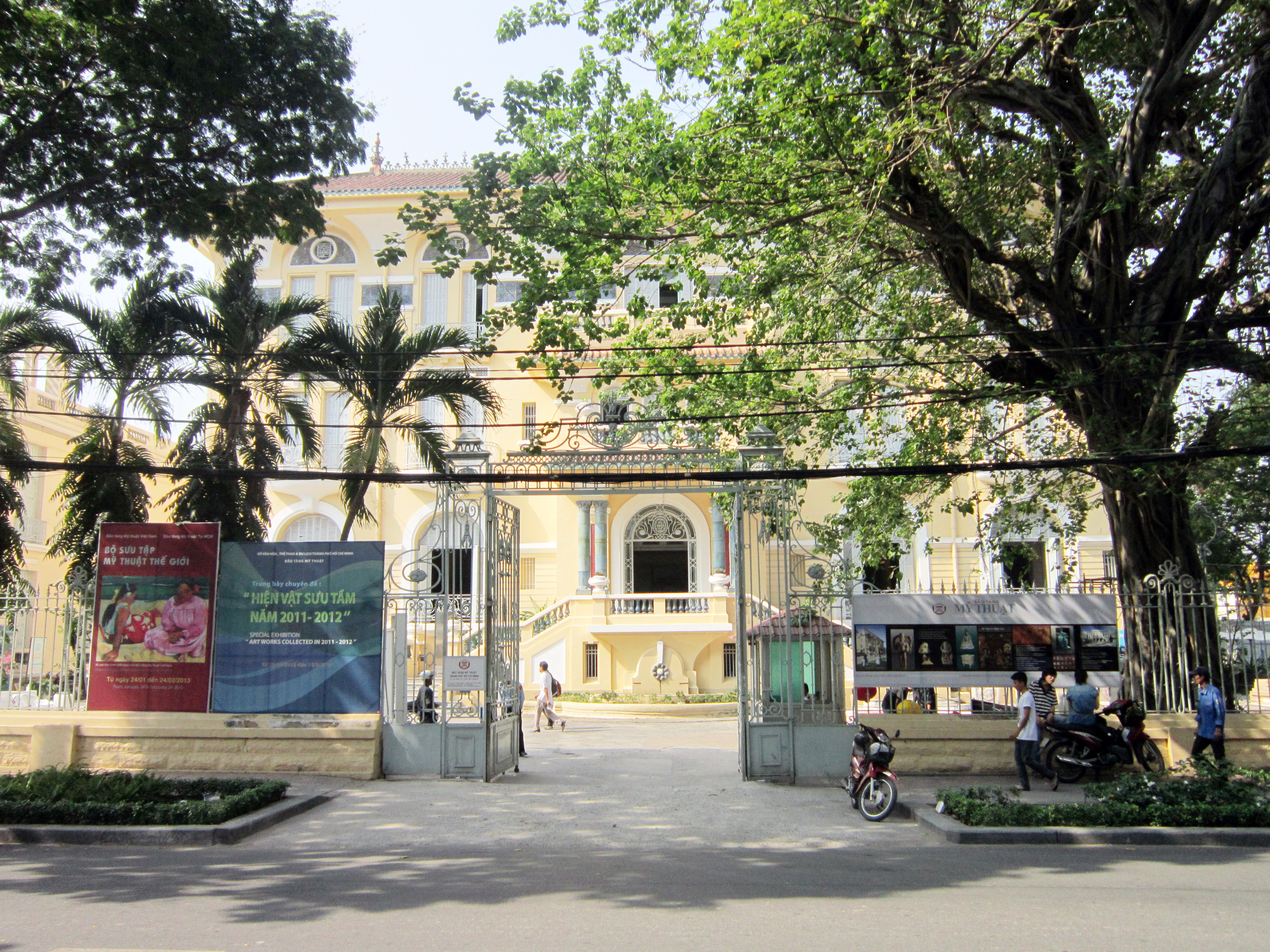 Bảo tàng Mỹ thuật Thành phố Hồ Chí Minh (Fine Arts Museum of Ho Chi Minh city) xây xong năm 1934. Chủ tòa nhà này khi xưa là ông Hui Bon Hoa (1845-1901), là một thương nhân giàu có và nổi tiếng của đất Sài Gòn xưa.